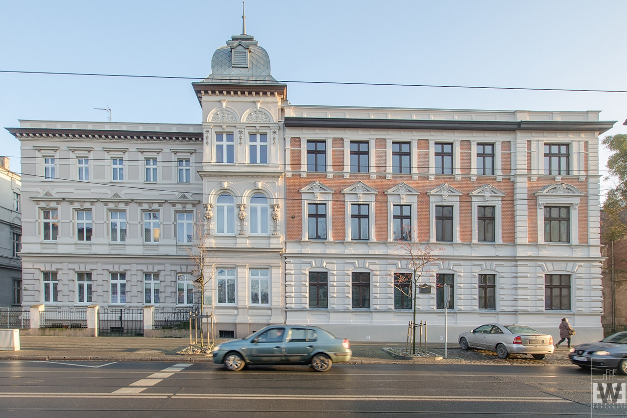 Kamienica przy ul. Gdańskiej 92-94 w Bydgoszczy (1889-1892, aut. Józef Święcicki)